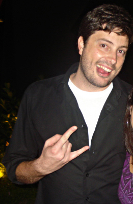 Danilo Gentili em 14 de setembro de 2008.